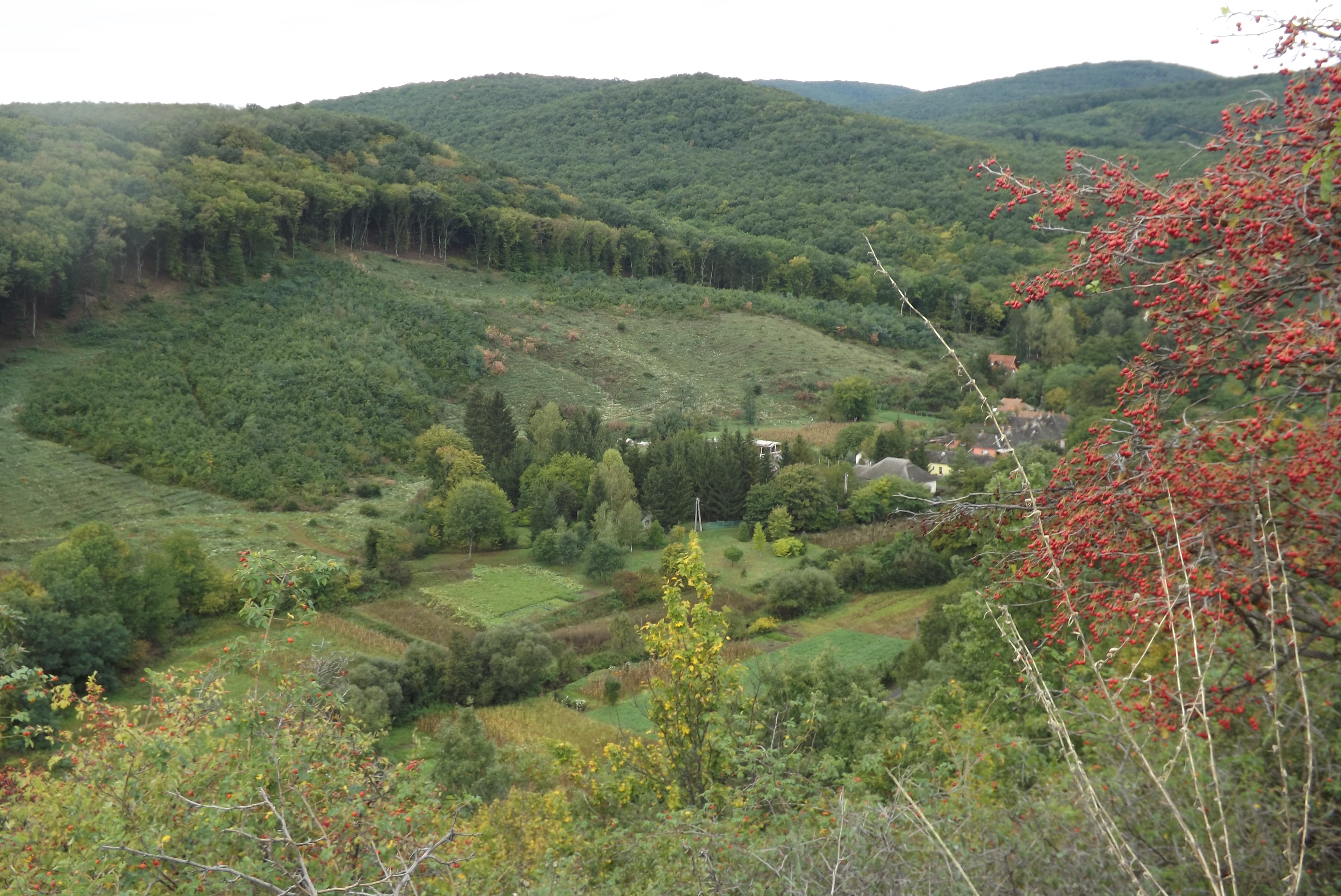 A várhegy alatt Latorvölgyben Latorpuszta házai